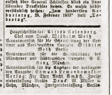 Impressum Völkischer Beobachter 1. März 1933. Text: Hauptschriftleiter: Alfred Rosenberg. Chef vom Dienst. Wilhelm Weiß. Verantwortlich für die Schriftleitung der Berliner und Norddeutschen Ausgabe. Wilhelm Metz, Berlin. Verantwortlich für die Schriftleitung der Münchner und Süddeutschen Ausgabe. G. L. Binz, München. Verantwortlich für die Anzeigen der vorliegenden Ausgabe: Edmund Lewandowski. Verlag: Frz Eher Nachf. G.m.b.H., Zweigniederlassung Berlin Druck: M. Müller u. Sohn, München, Zweiniederlassung Berlin.